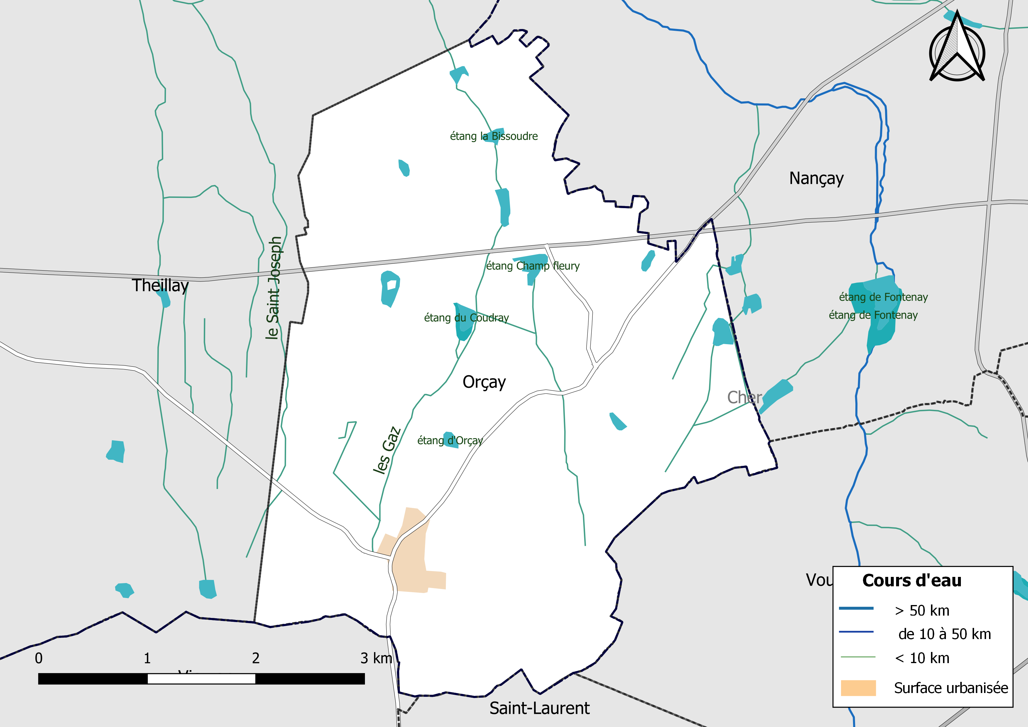 Carte du réseau hydrographique de la commune de Orçay (Loir-et-Cher, France).